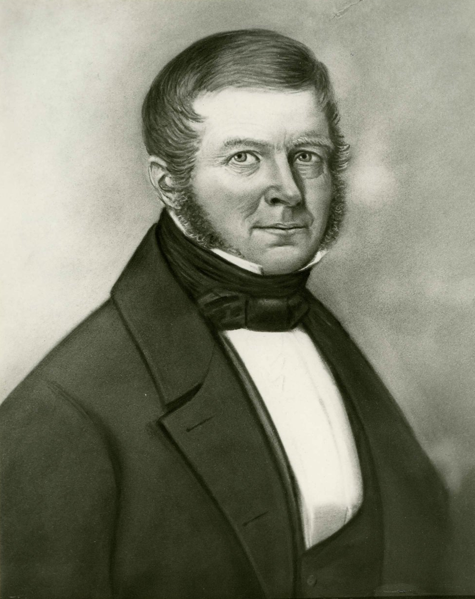 Tekening met het portret van Jan Arkema, burgemeester van Warffum tussen 1846 en 1852